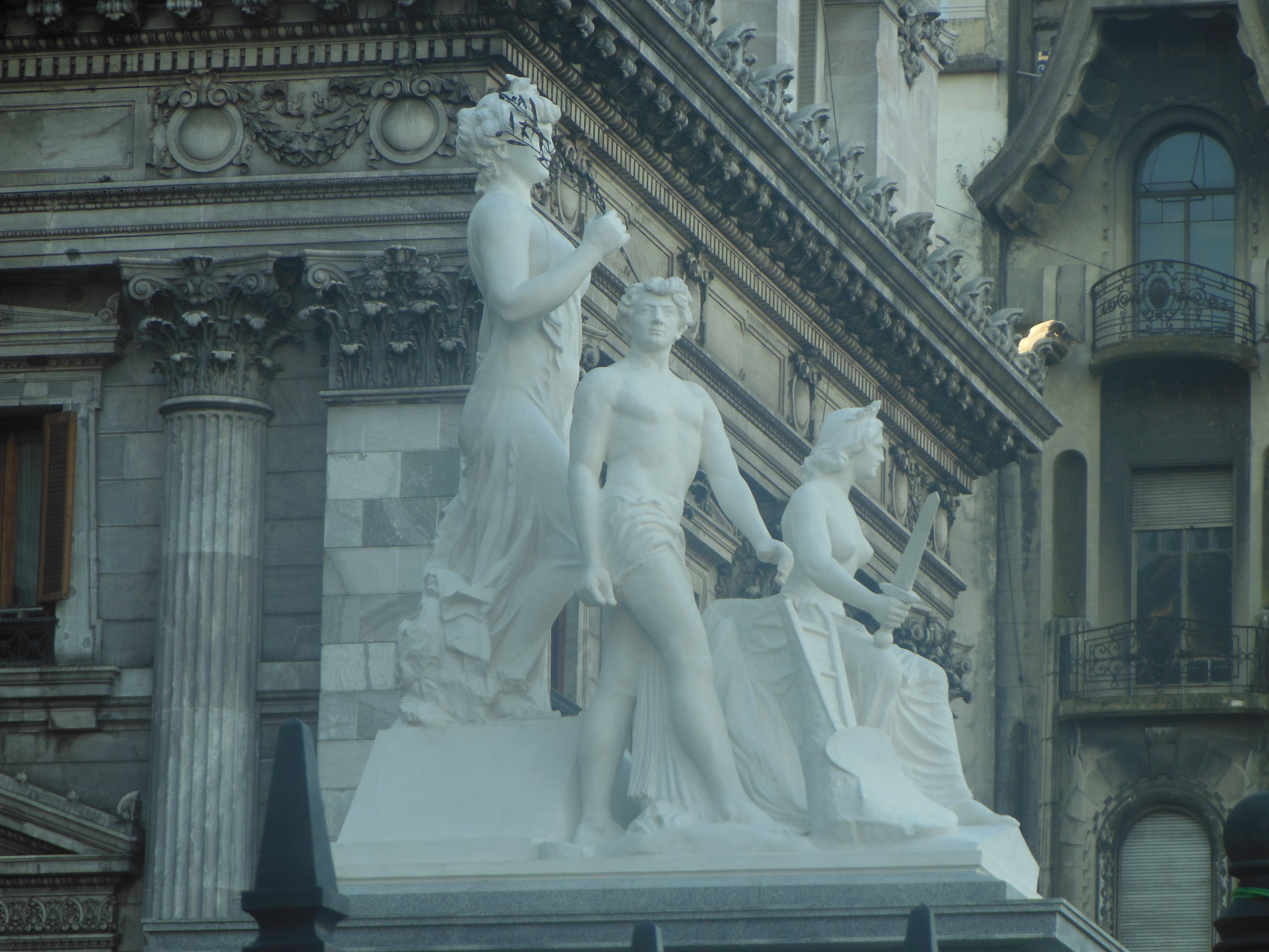 La Justicia, el Trabajo y la Paz [Justice, Work and Peace] (1916) de Lola Mora, Palacio del Congreso de la Nación Argentina (lado Sur)